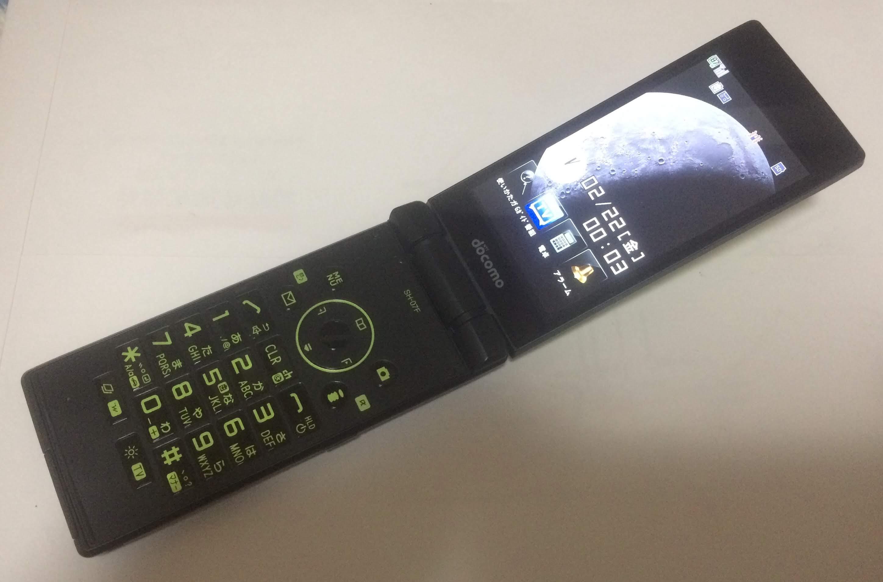 SH-07F（グリーン）の外観